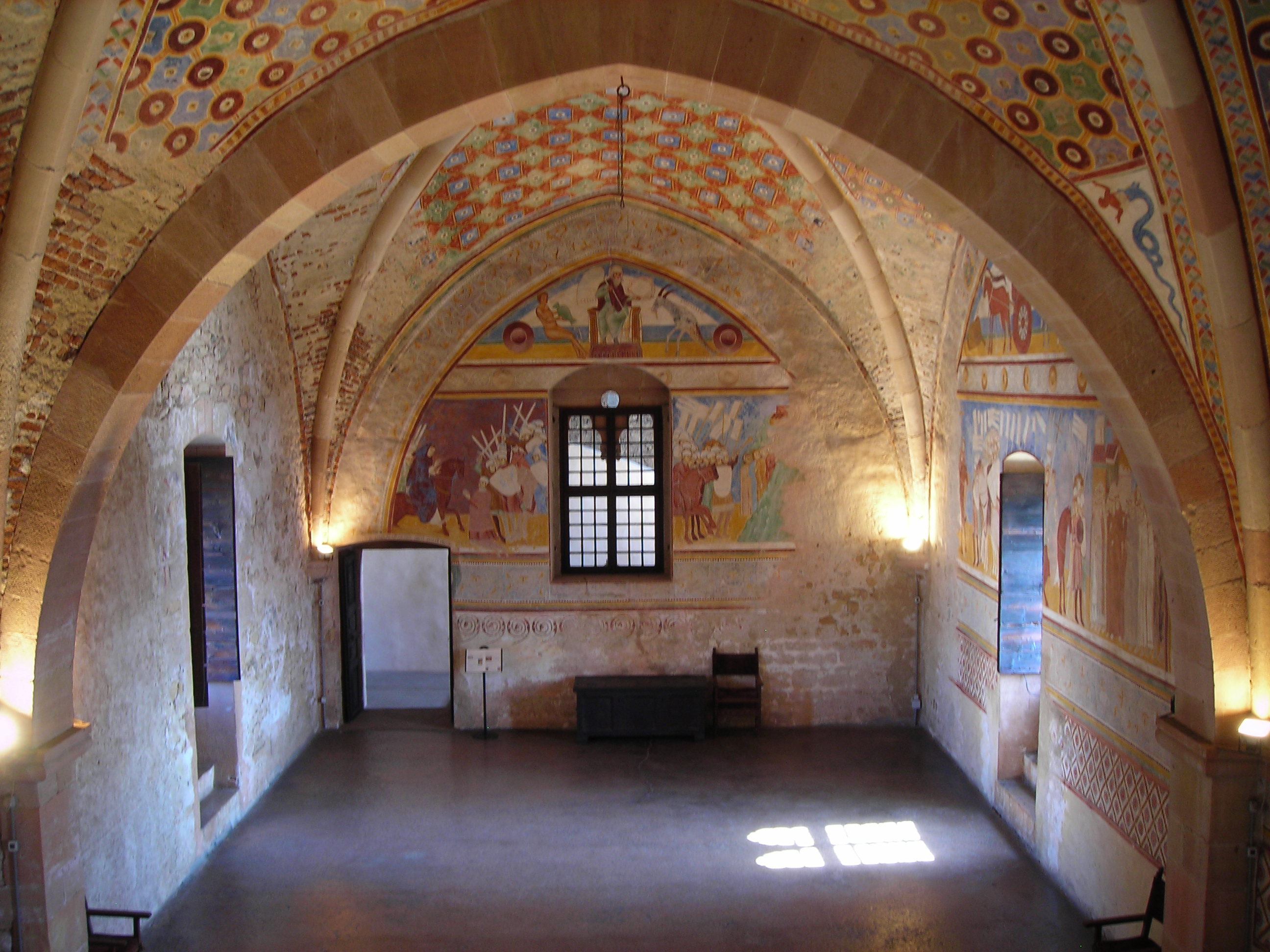 Rocca Borromea di Angera, Sala di Giustizia.